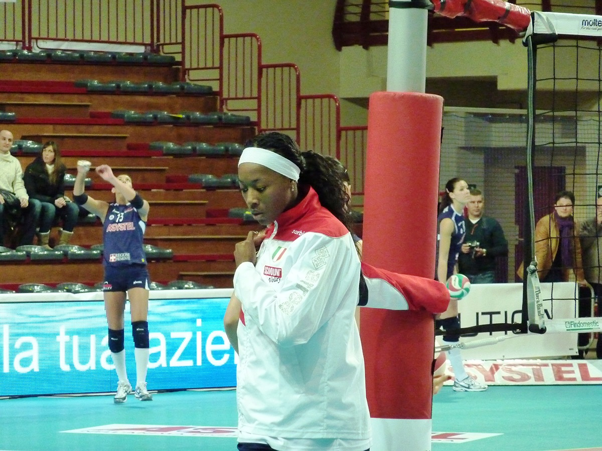 Destinee Hooker, pallavolisti statunitensi, gioca nel ruolo di schiacciatore ed opposto